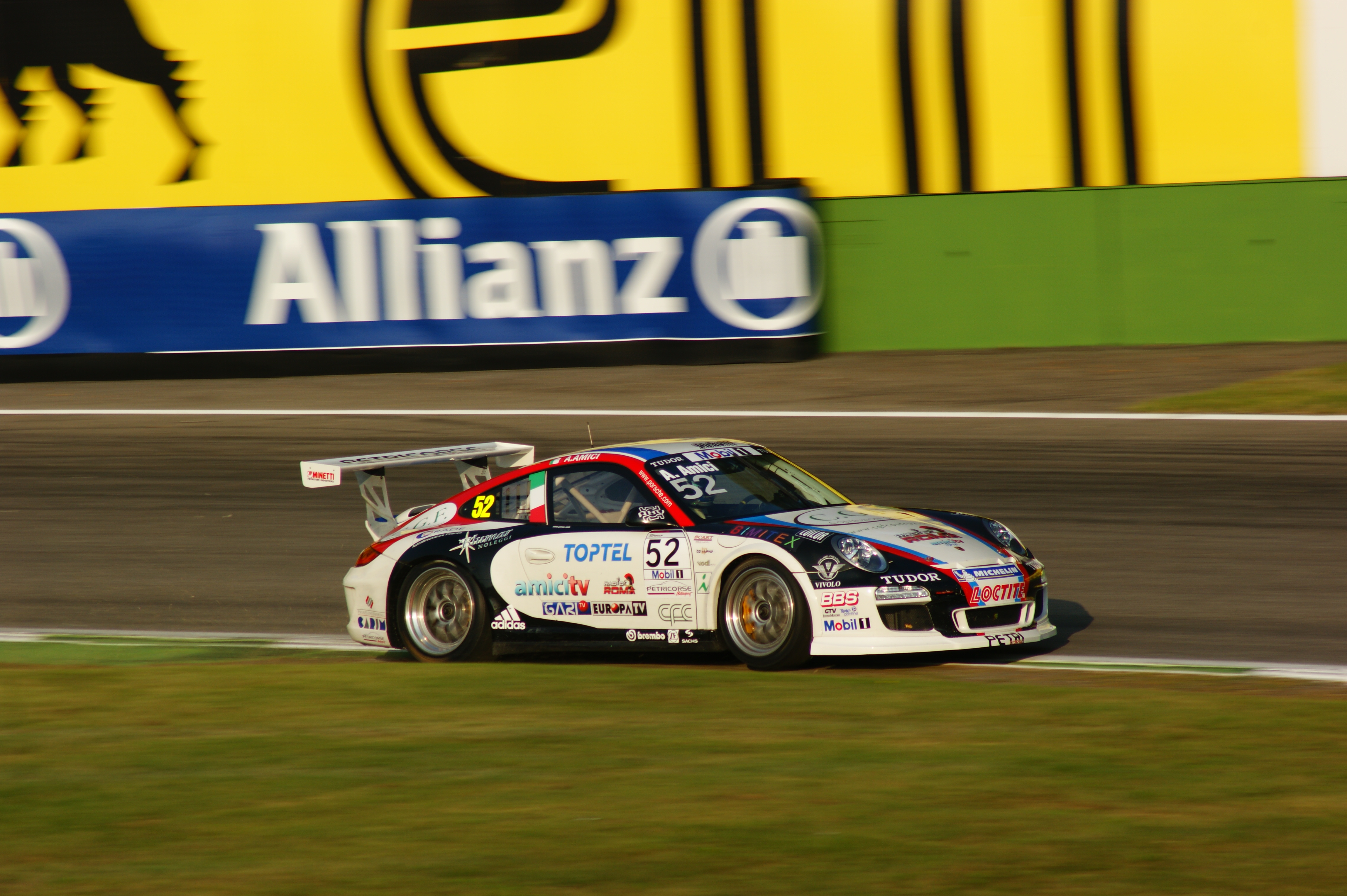 Andrea Amici alla variante Ascari Monza 2011